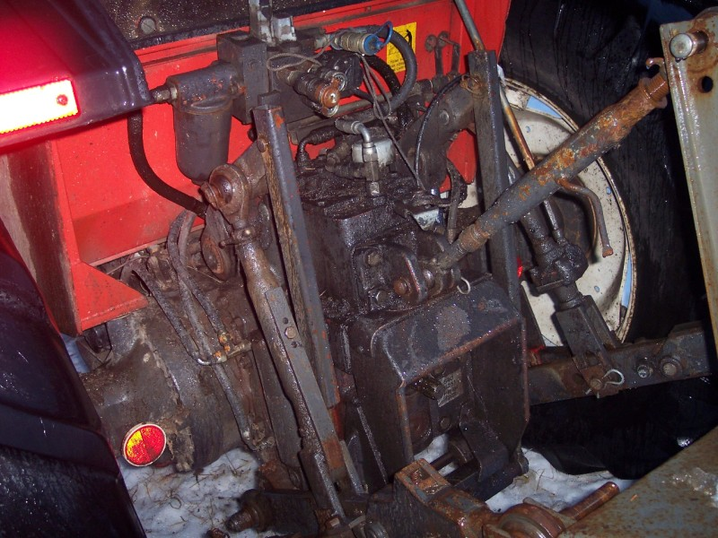 Traktor: Bake på en Valmet... Tatt av ThorRune på praksisgården, hos Hans Einar Stendal.